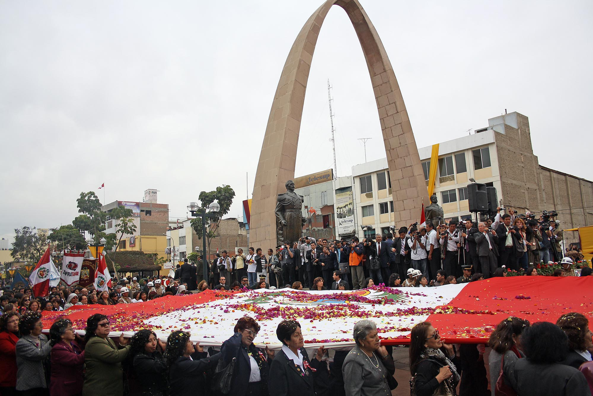 El ministro de Defensa, Pedro Cateriano Bellido, junto al Primer Ministro, Juan Jimenez Mayor y altas autoridades civiles y militares, presidió la ceremonia por el 84 Aniversario del retorno de Tacna al suelo patrio. El evento se realizó en esta ciudad.